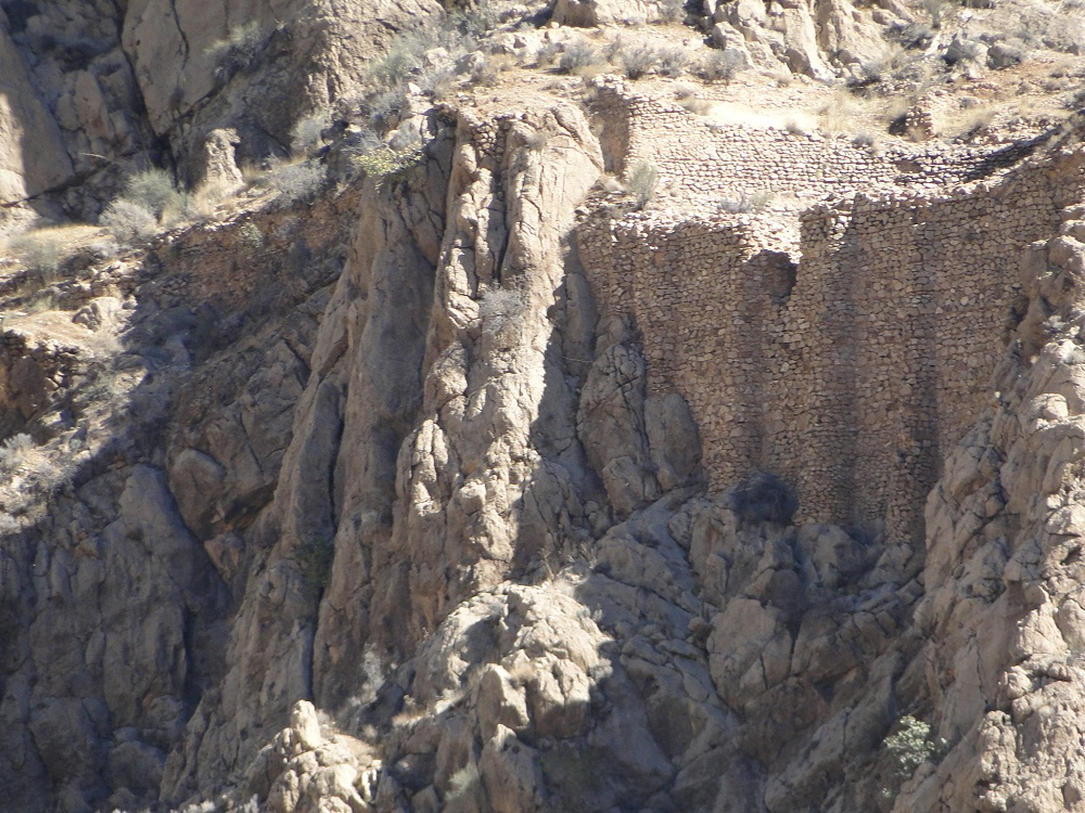 قسمتی از دیوار ویران شده قلعه دارالاامان